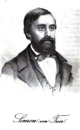 Ludwig Gerhard Gustav Simon, genannt Simon von Trier